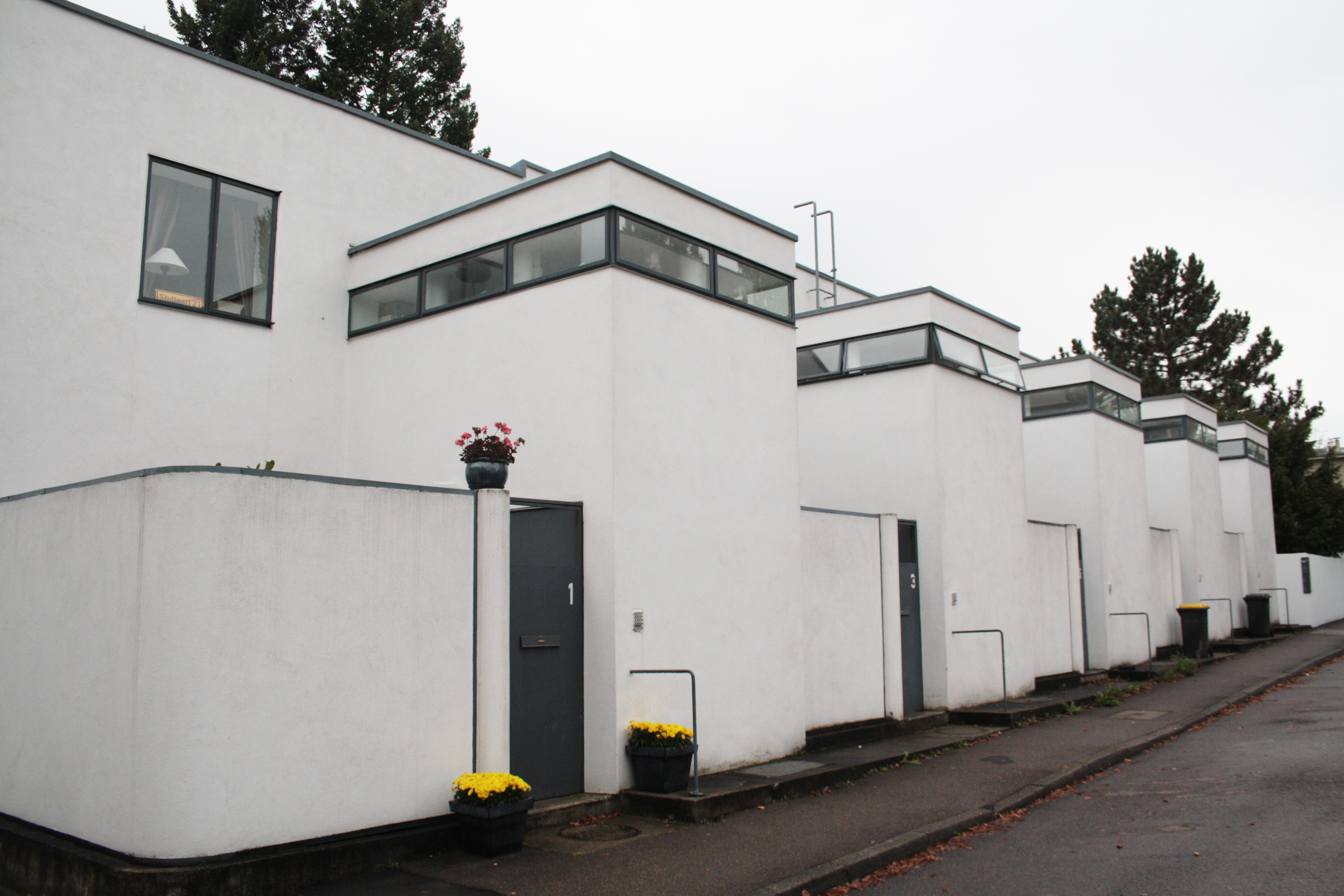 Weißenhofsiedlung